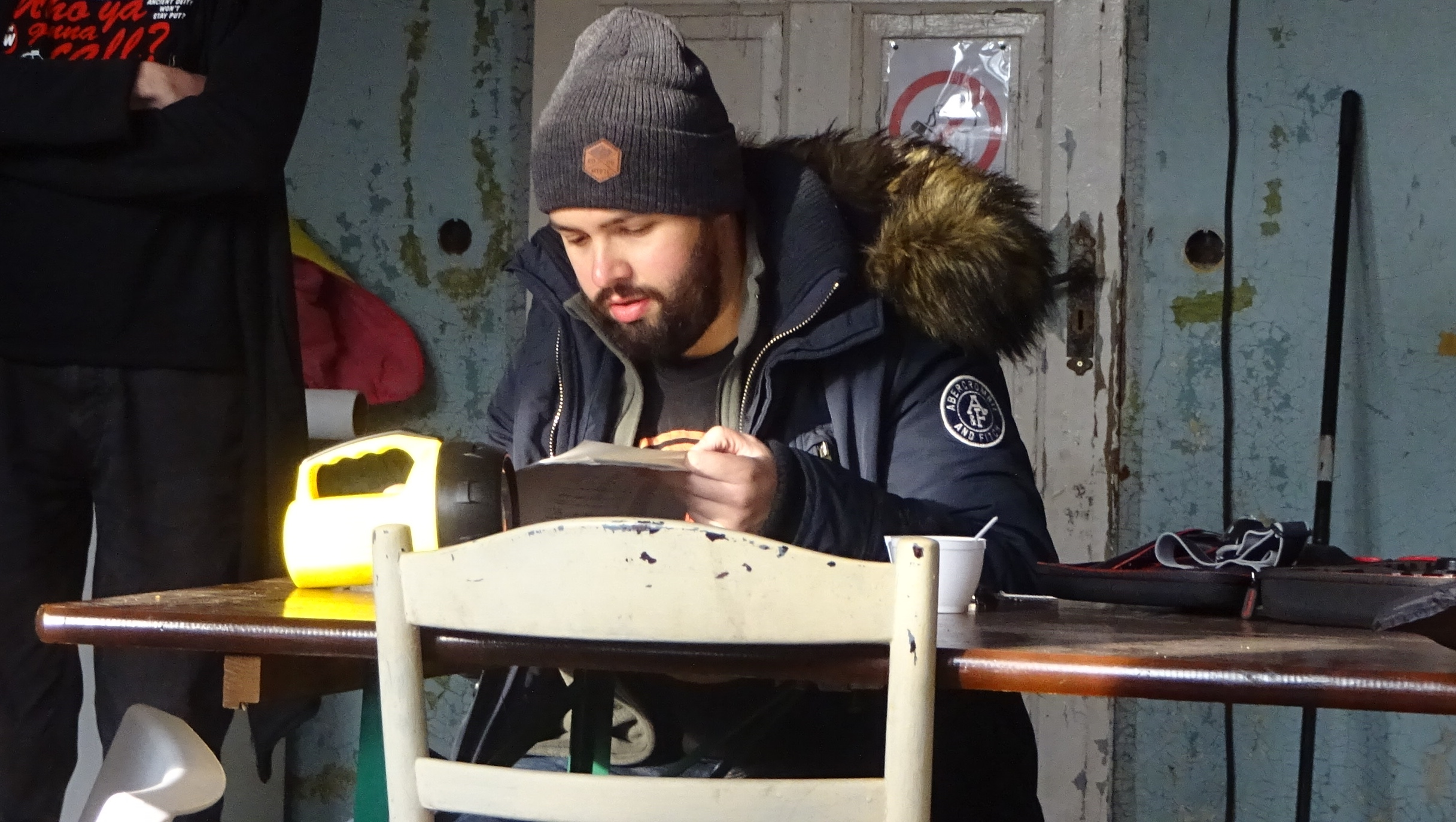 David Brückner (Regisseur)